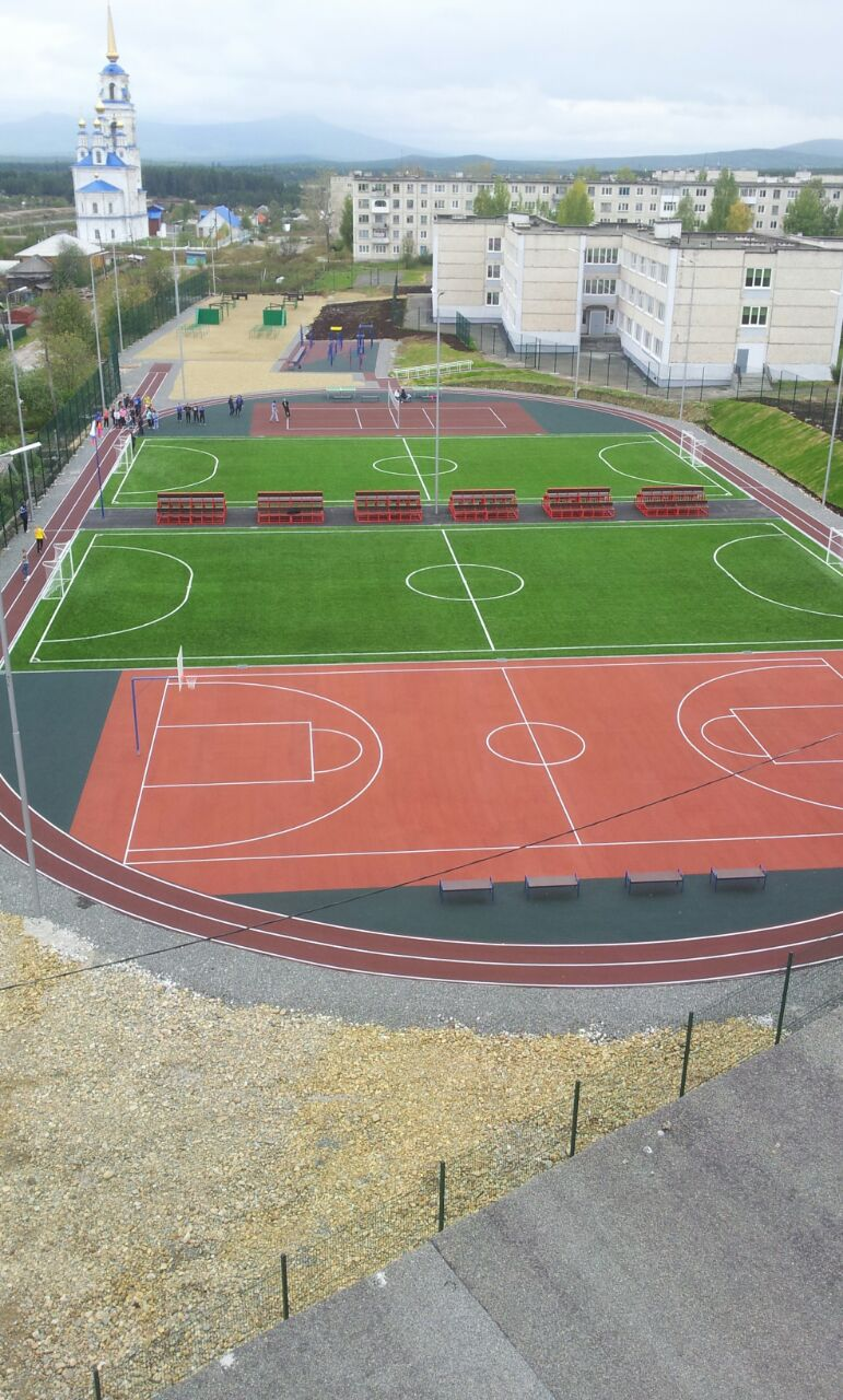 Стадион школы №8 г. Североуральск - сентябрь 2016